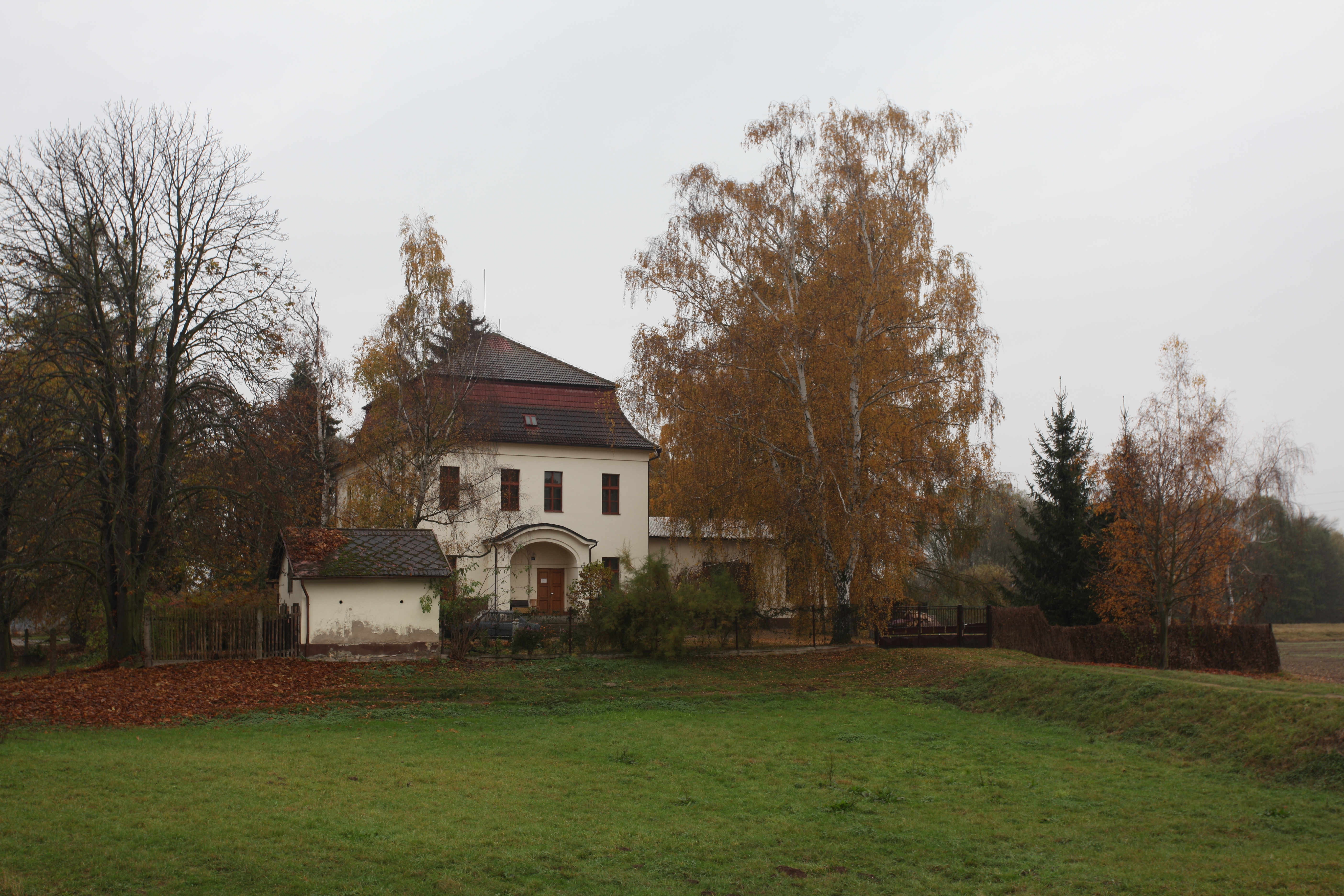 Česky: Jedna z čerpacích stanic surové vody v úpravně vody v Káraném. Voda je zde načerpávána pod tlakem na principu vývěvy přímo z řeky Jizery. Dále je potrubím dopravována na pískové rychlofiltry určené k hrubému očištění od nečistot. Poté putuje do vsakovacích nádrží k umělé infiltraci do místních štěrkopískových vrstev, kde se přirozeně čistí. Zdroje: Křivánek, Oldřich a Kněžek, Miroslav. 2001. Zdroje pitné vody v Káraném. Principy získávání vody v oblasti káranské vodárny. Pražské vodovody a kanalizace a.s.